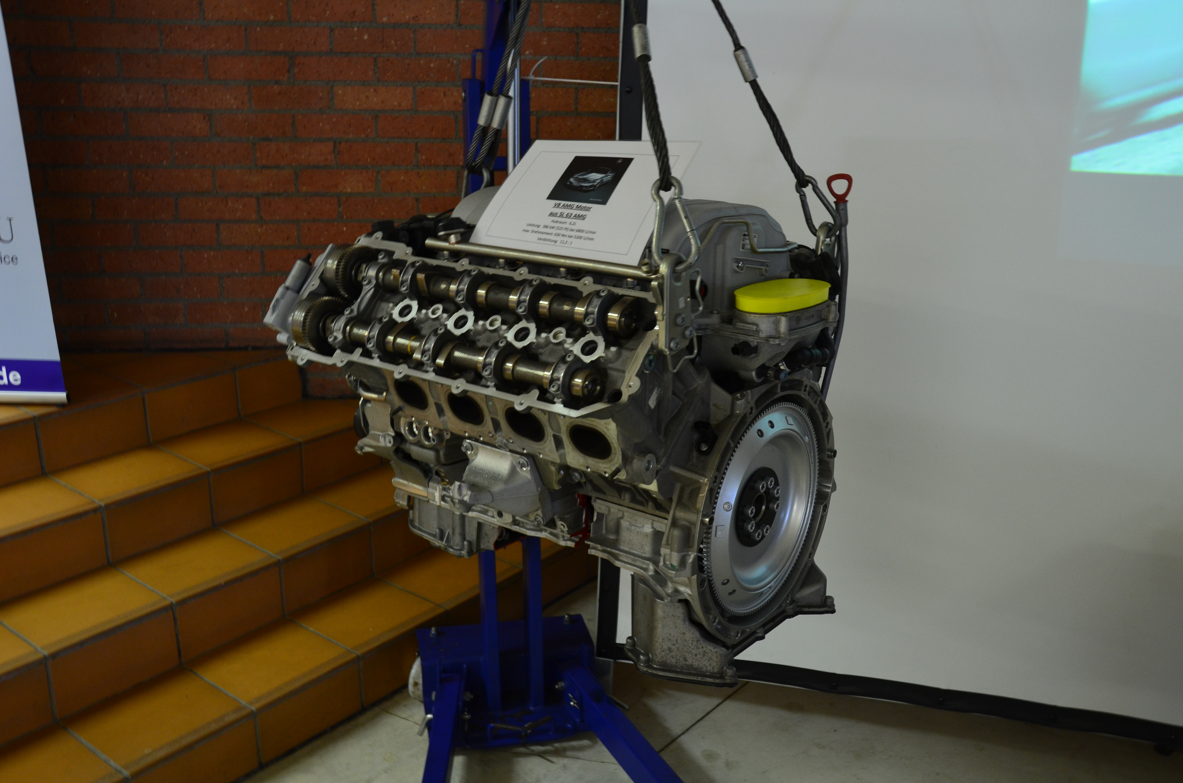 V8 AMG Motor aus SL 63 AMG - Hubraum 6,2 Liter - 525 PS bei 6800 Umdr./Min. - max. Drehmoment 5200 Umdr./Min. - Verdichtung 11,3 : 1